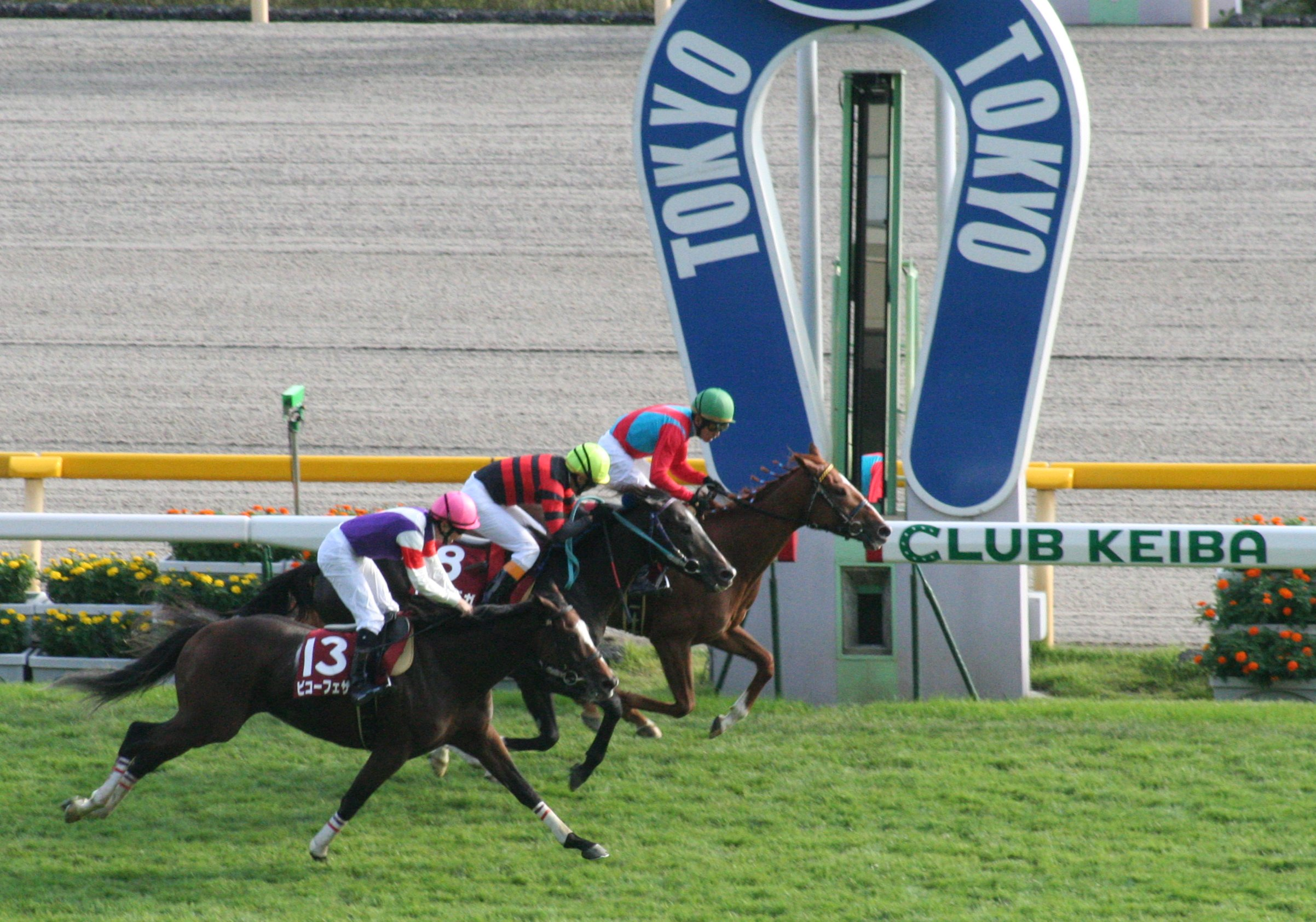 第12回東京ハイジャンプ